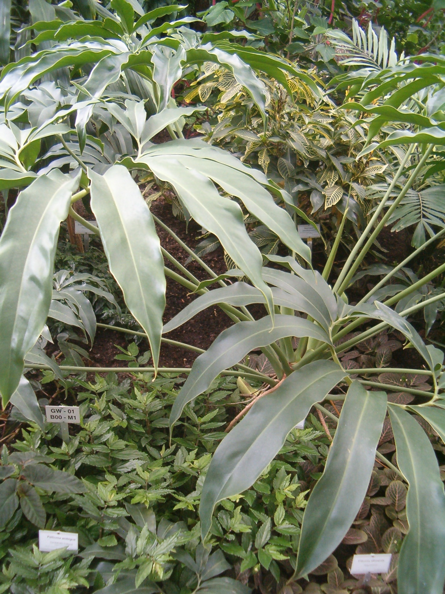 At Botanical Gardens Berlin-Dahlem Species Philodendron goeldii